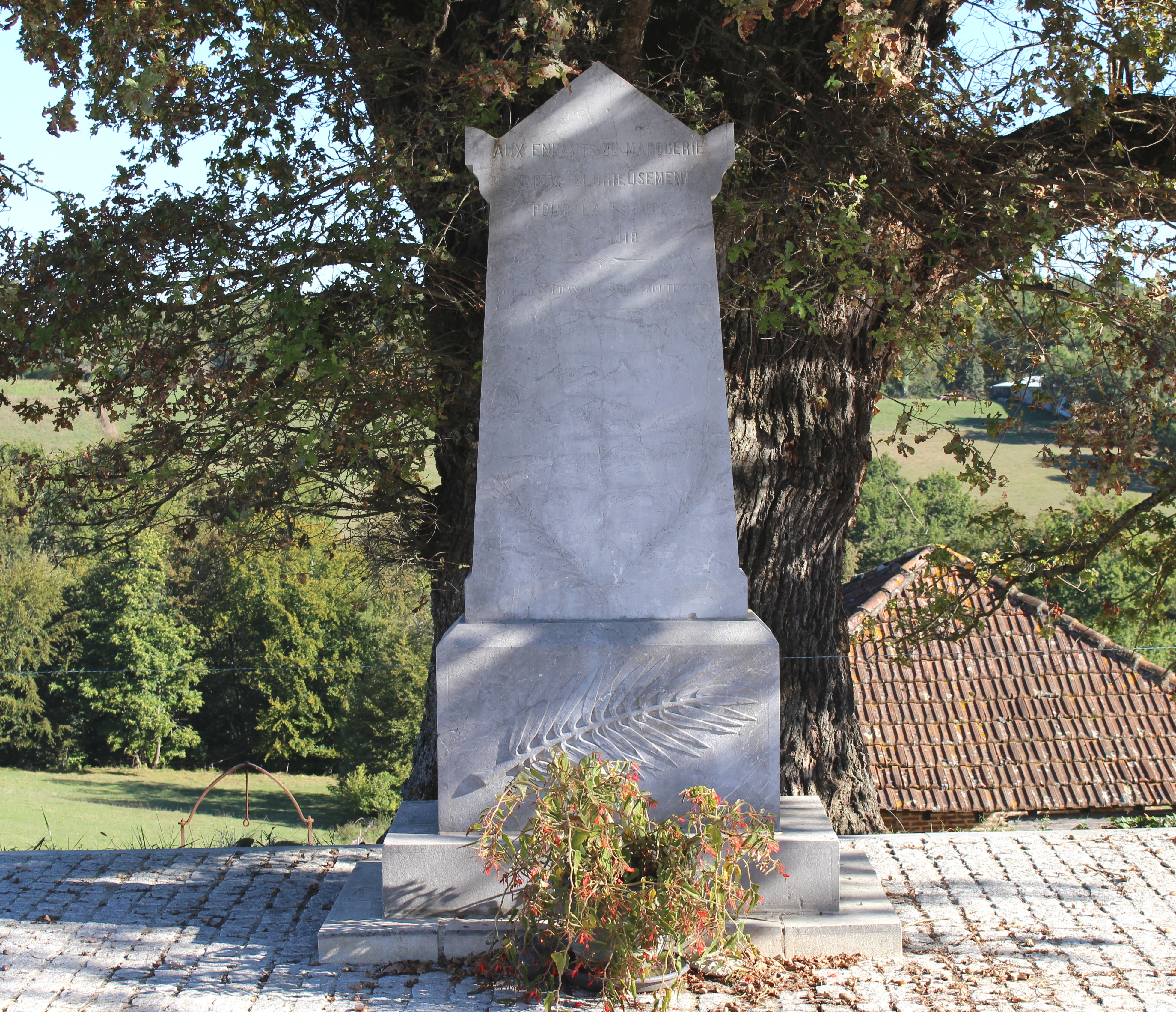 Monument aux morts de Marquerie (Hautes-Pyrénées)